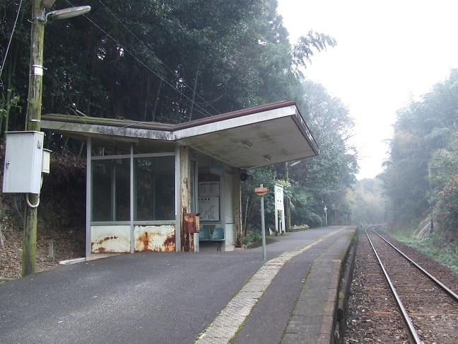 JR吉都線の駅の駅舎写真